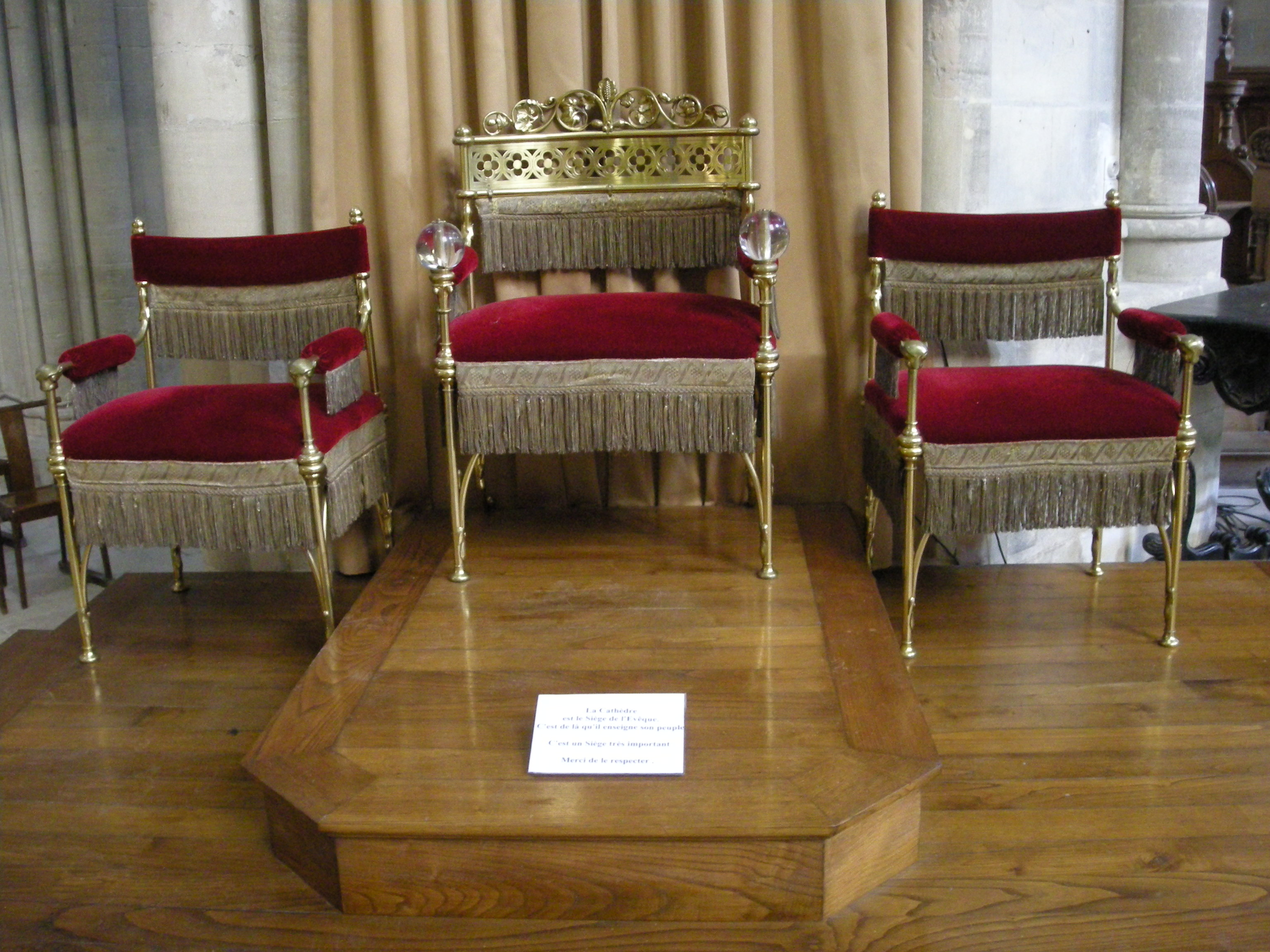 La cathèdre de l'évêque à Coutances (Normandie)